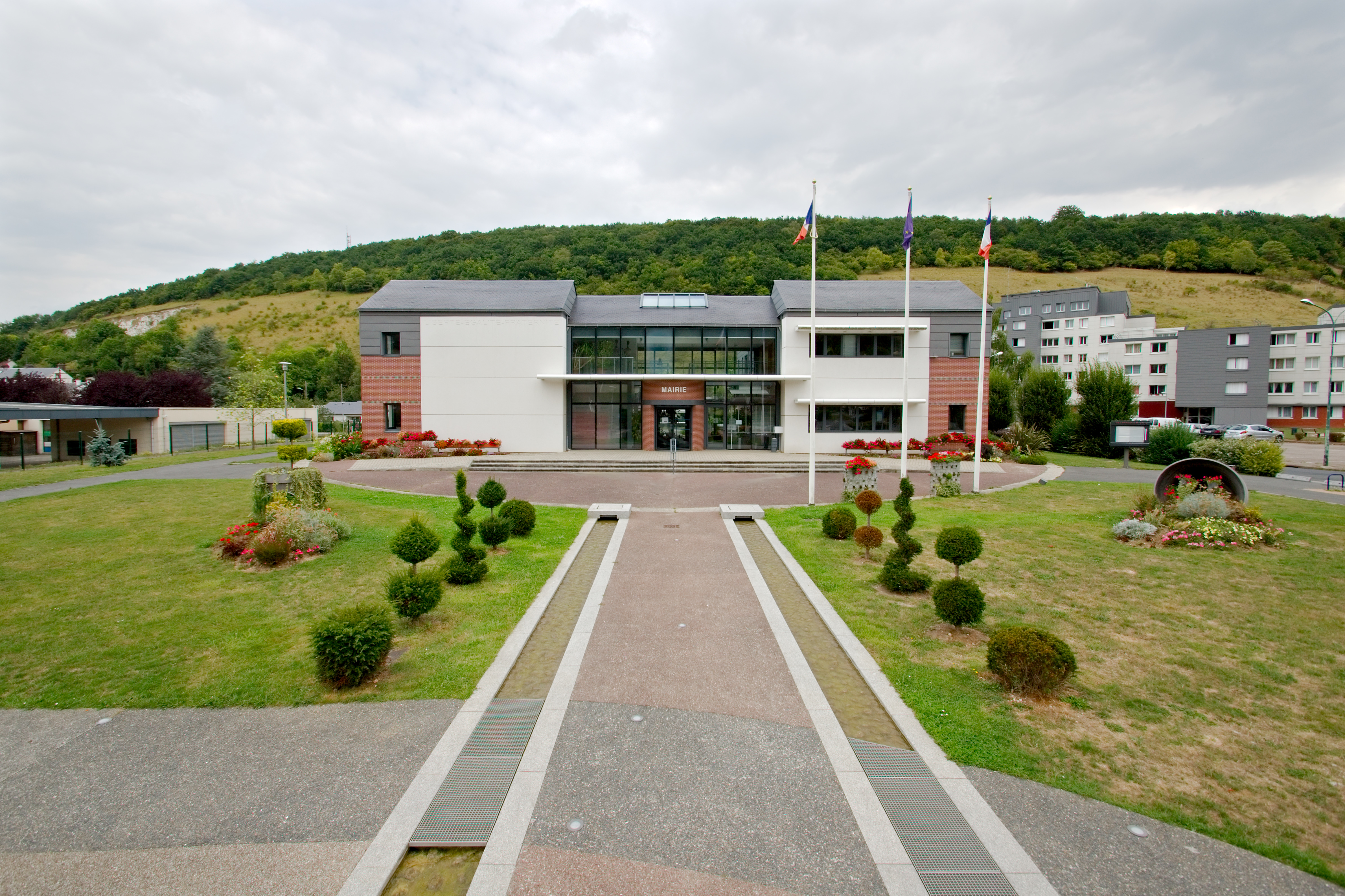 Mairie de Saint-Léger-du-Bourg-Denis route de Lyons-la-Forêt à Saint-Léger-du-Bourg-Denis